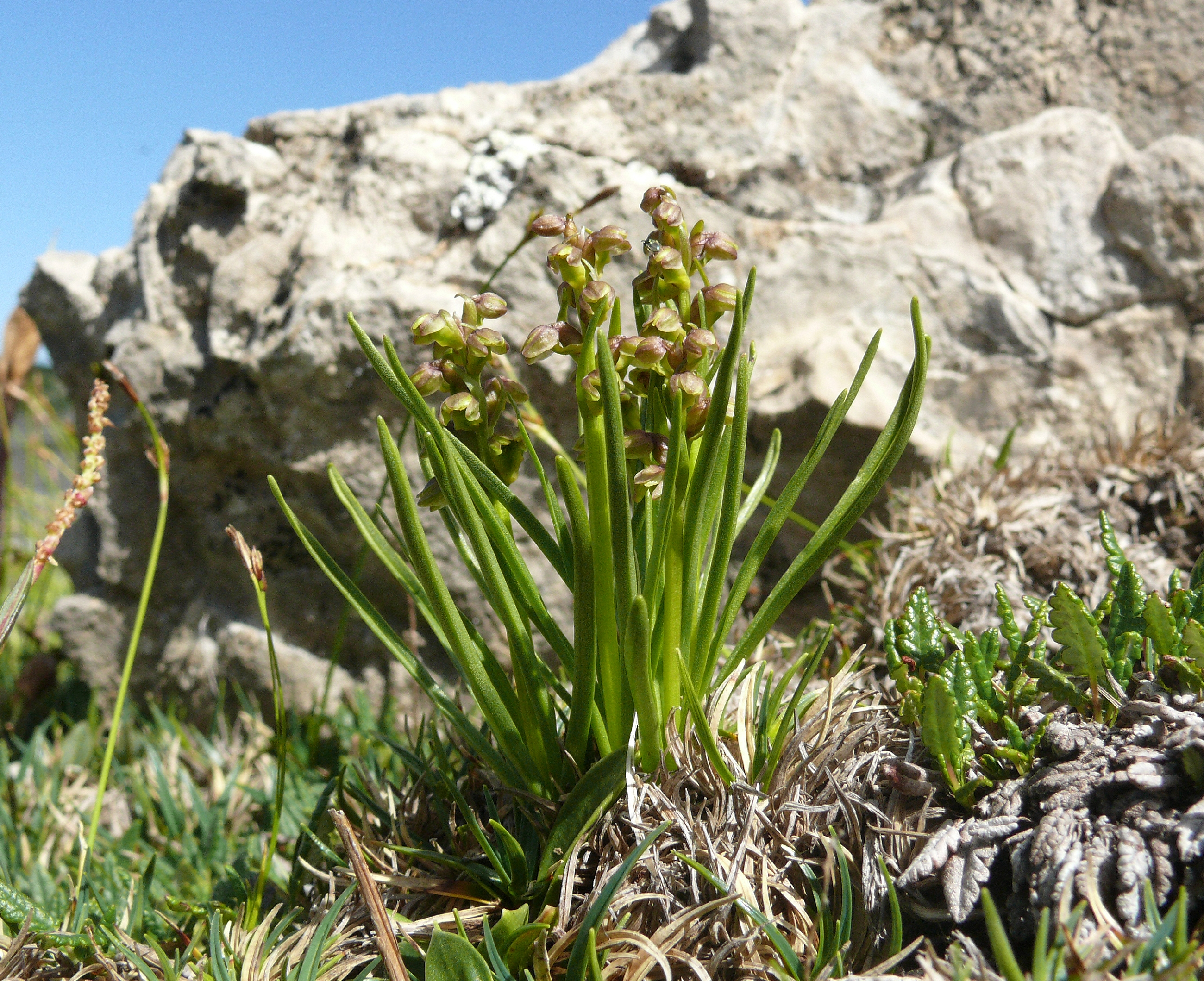 Chamorchis alpina, Allgäuer Alpen, Österreich